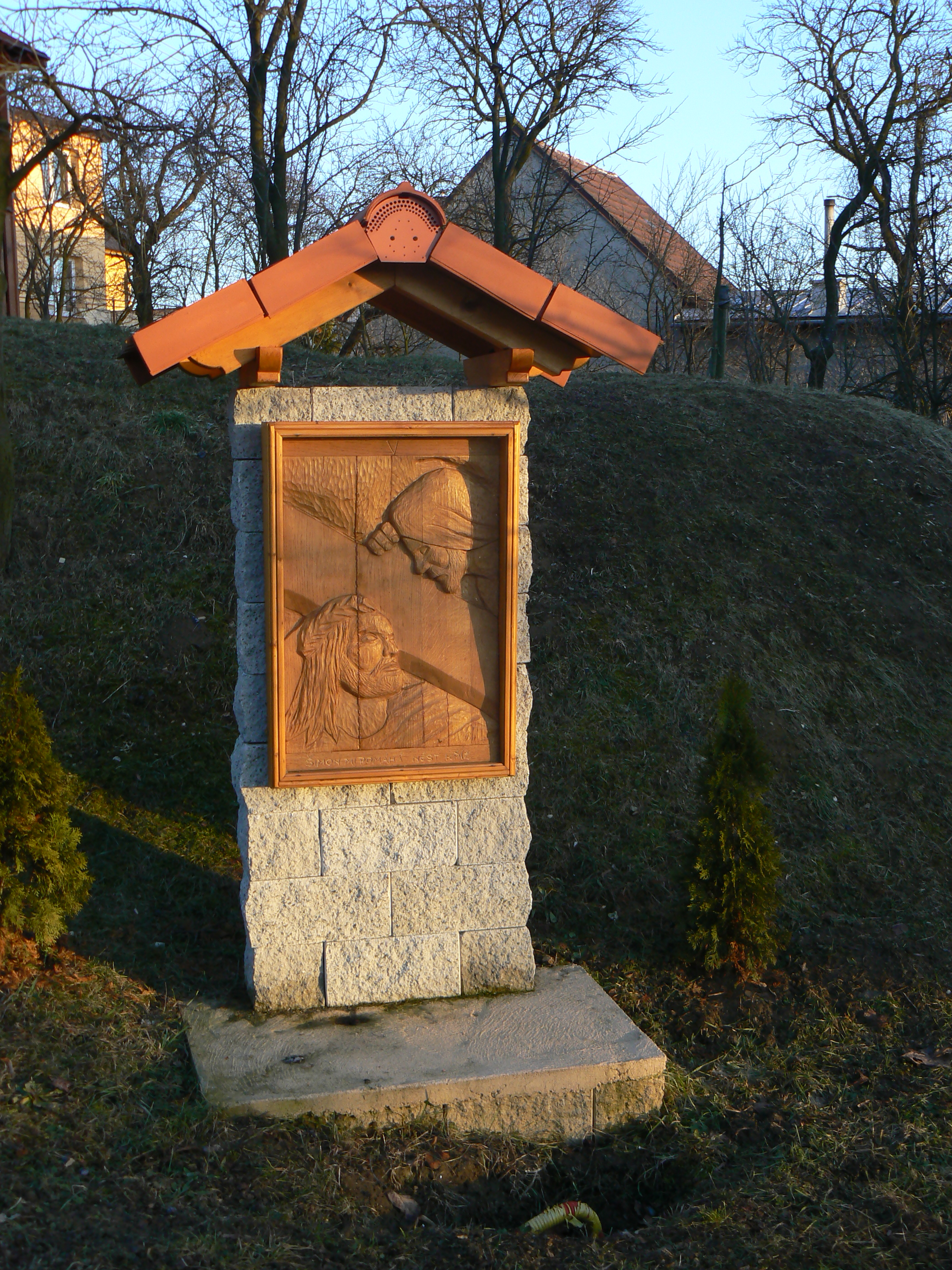 Ořechov, okres Uherské Hradiště - křížová cesta. This photograph was taken within the scope of the 'Czech Municipalities Photographs' grant.